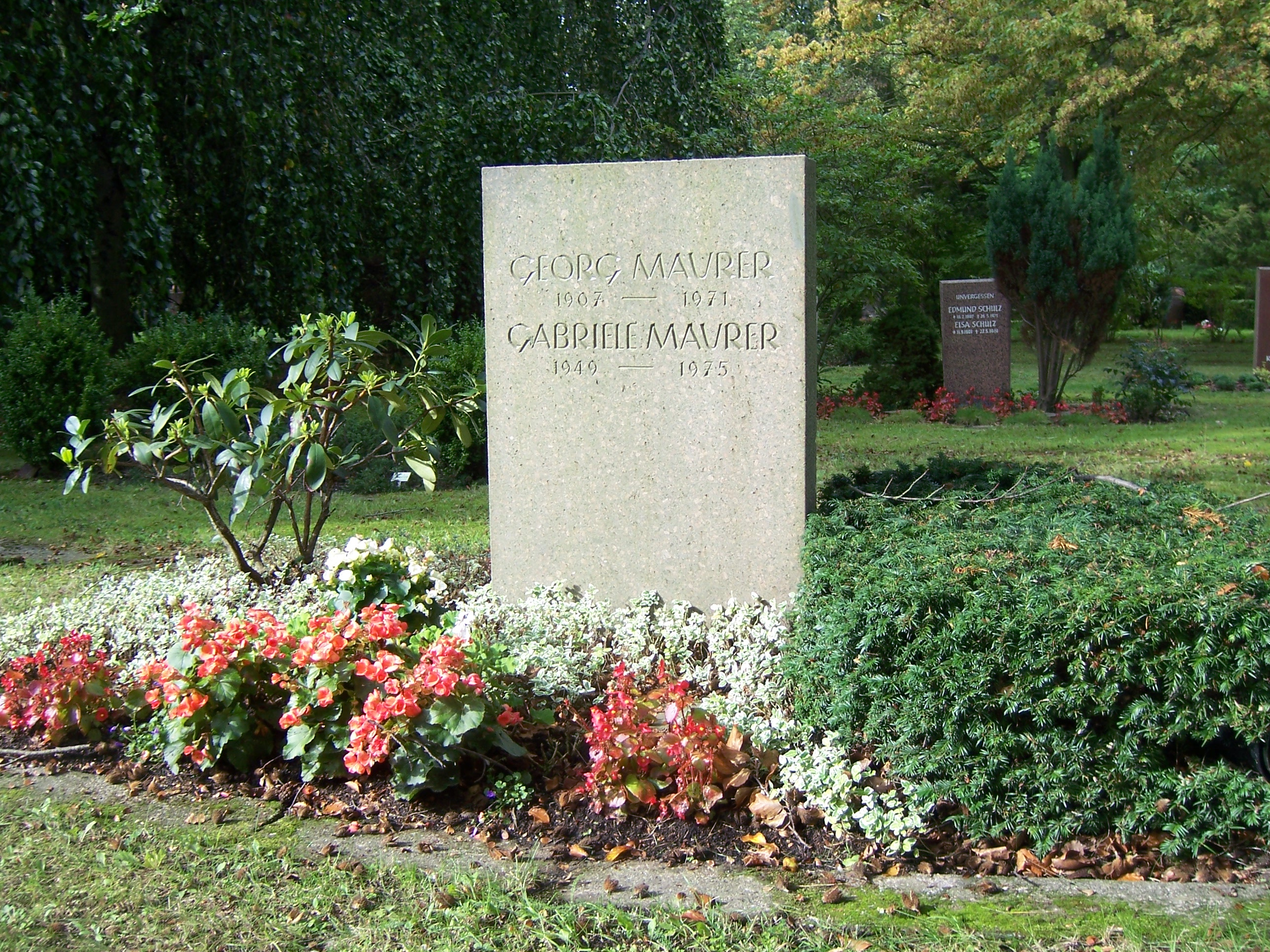 Grabstätte Georg Maurer